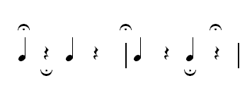 Description : Point d'orgue Source : Personnelle Licence : GFDL